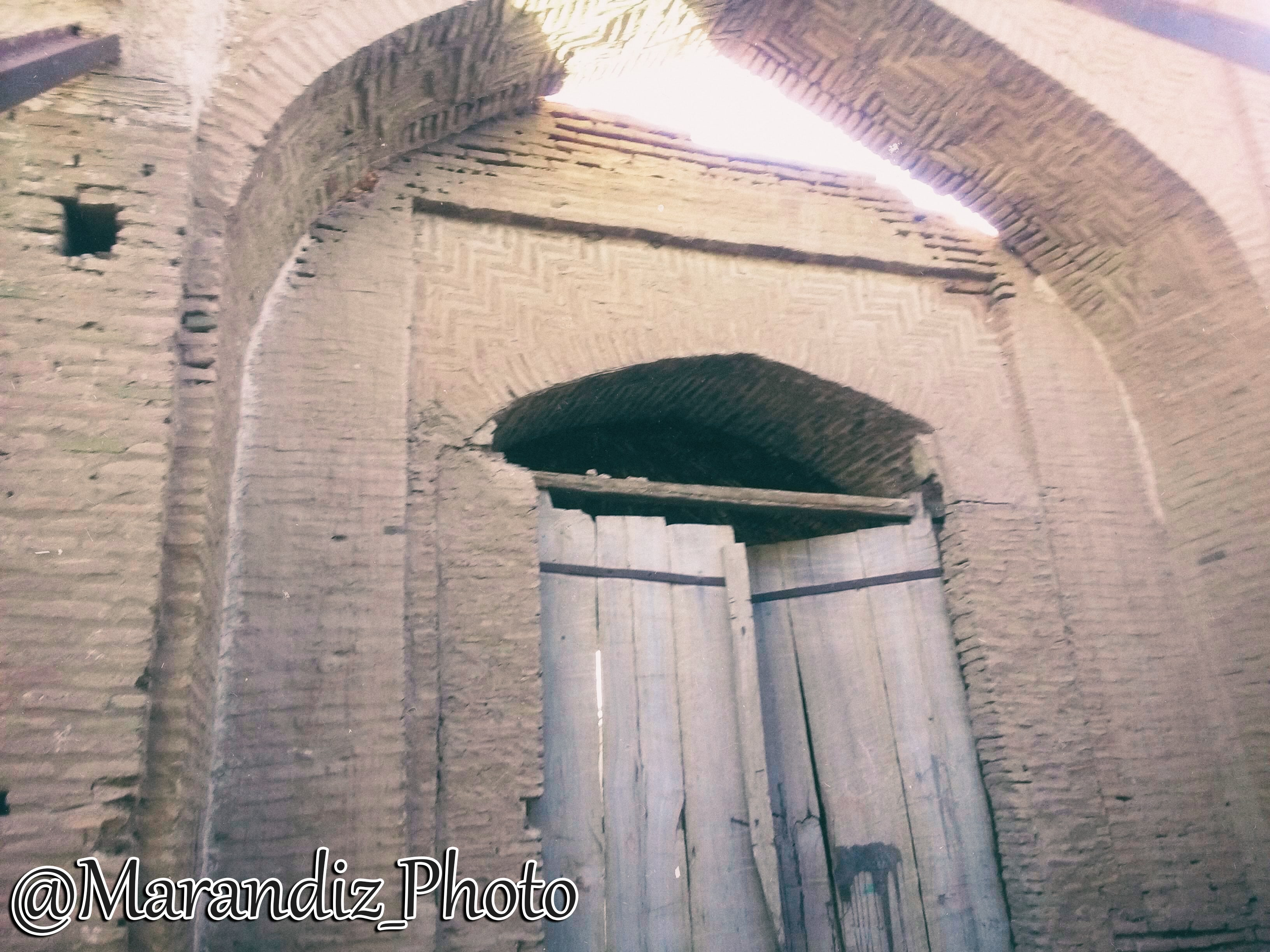 کاروانسرای مرندیز